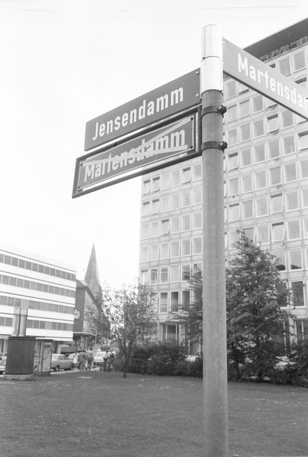 Das Teilstück zwischen Küterstraße und dänischer Straße wird nach dem verstorbenen Stadtbaurat Prof. Herbert Jensen benannt. Straßenschild am Übergang vom Martensdamm zur Bergstraße.